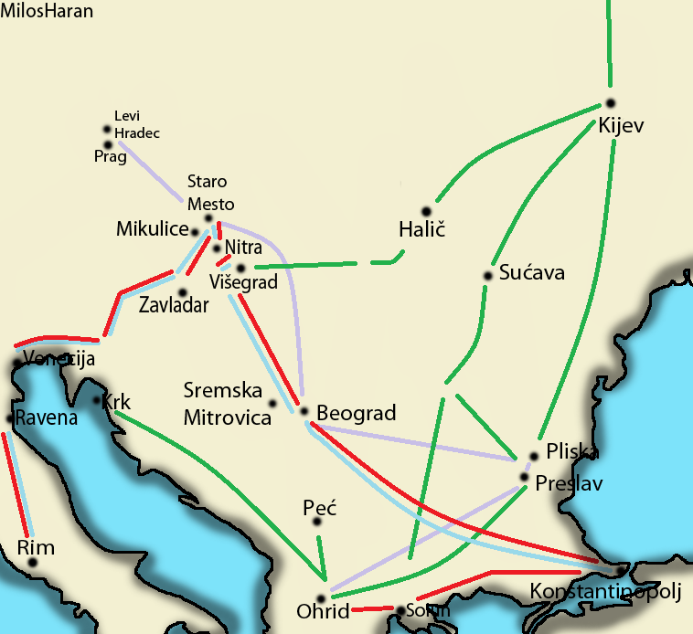 Plava - Misija Ćirila i Metodija 863-867. godine Crveno - Metodijeva putovanja nakon Ćirilove smrti Ljubičasto - Pravci kretanja Metodijevih učenika posle 885. godine Zeleno - Kasnije širenje ideja Ćirila i Metodija